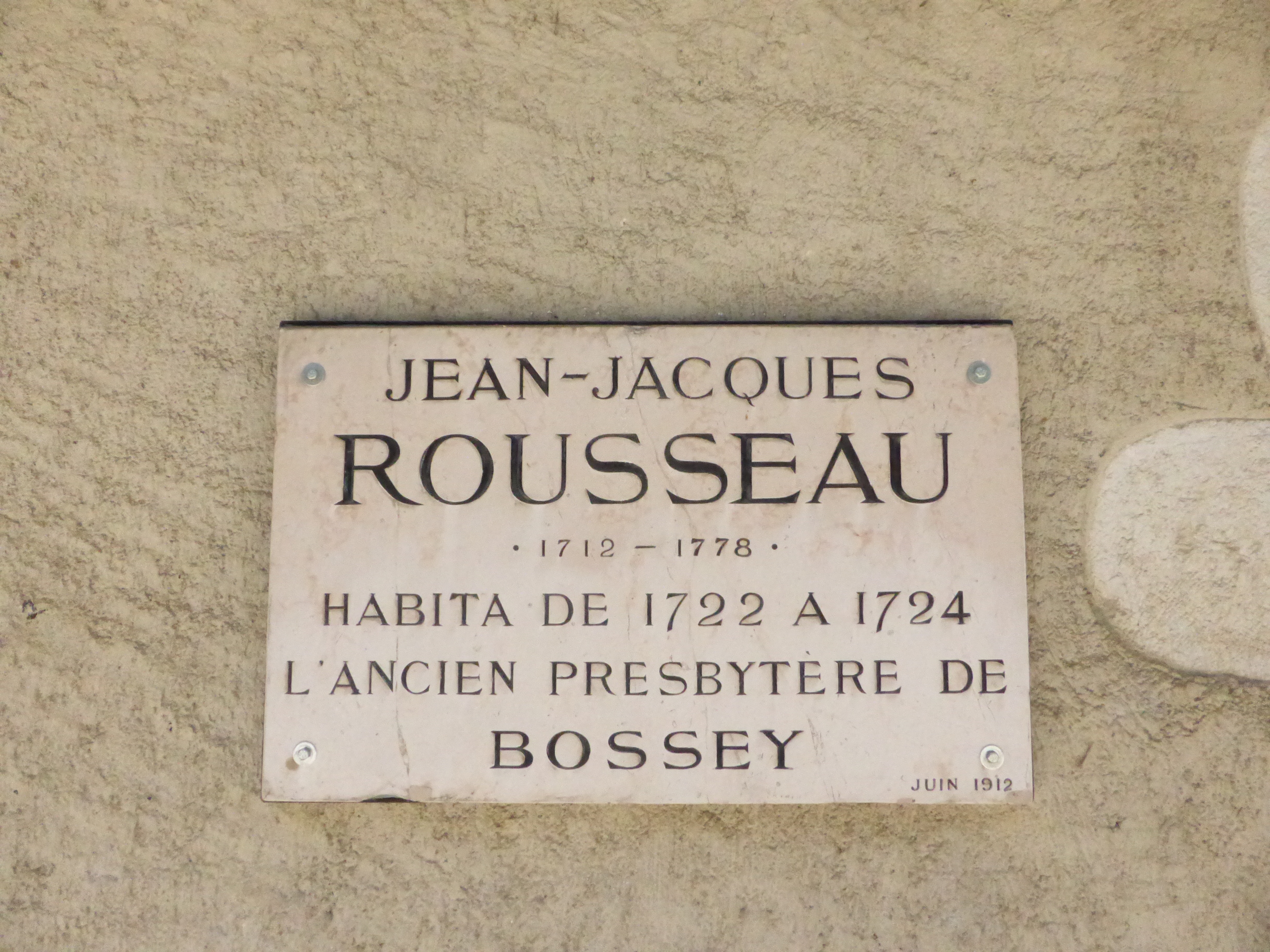 Plaque commémorative dédiée au séjour de Jean-Jacques Rousseau dans l'ancien presbytère apposée sur l'église Saint-Pierre de Bossey, en Haute-Savoie.